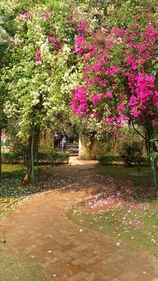 A street in Daffodil International University campus in Ashulia, Bangladesh. Known as "Python Street" as it looks like a python. Photo Captured by Nazim Saleh